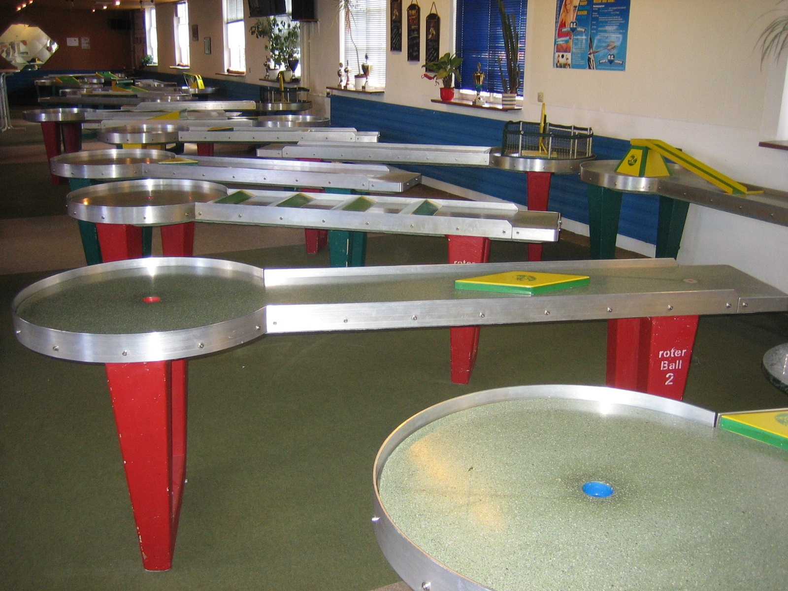 pit-pat Anlage des pit-pat POWER-Club Ofterdingen e.V.